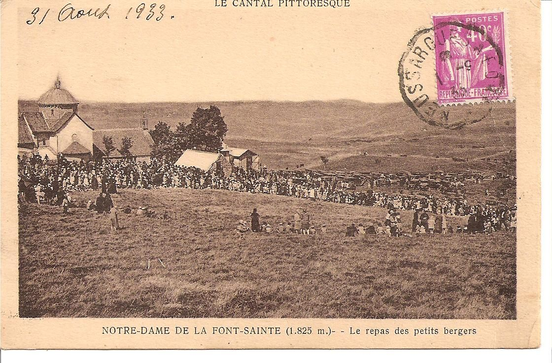 Notre-Dame de La Font-Sainte à Saint-Hippolyte (Cantal)